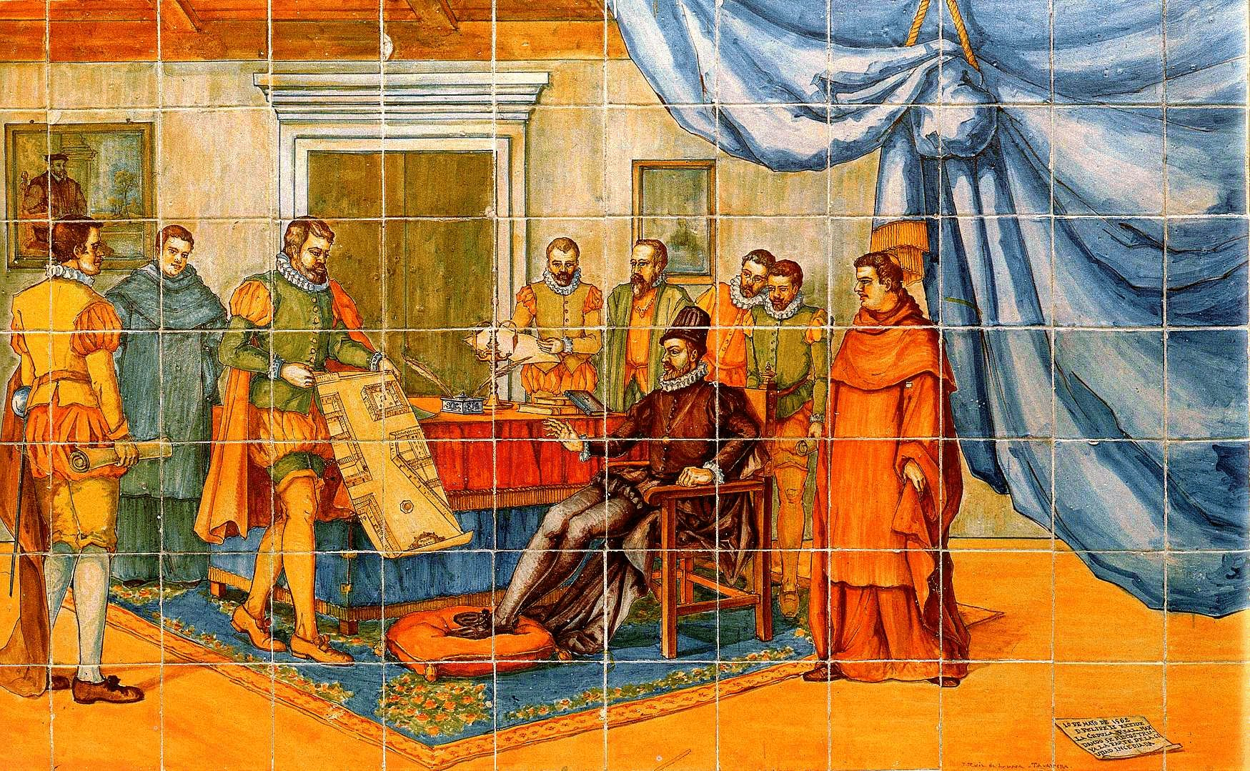 Felipe II ordena la reconstrucción de la parte incendiada (Zaguan del Palacio Pimentel)